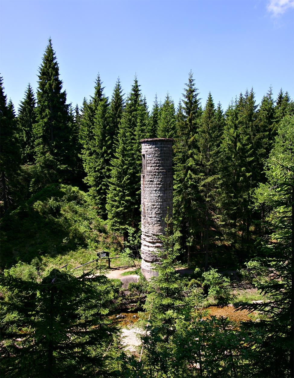 Zbytky protržené přehrady na Desné. (vlastní fotografie)